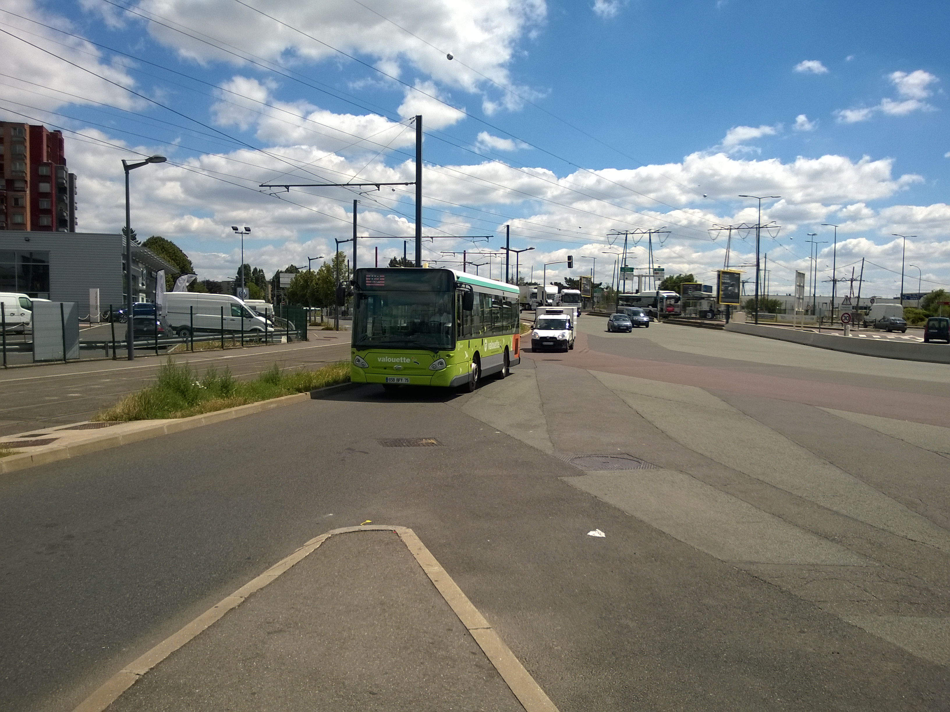 Avenue de la Cité, Chevilly-Larue (département du Val-de-Marne,France).Heuliez GX 127 assurant une navette de la ligne v2 (réseau Valouette exploité par la RATP).